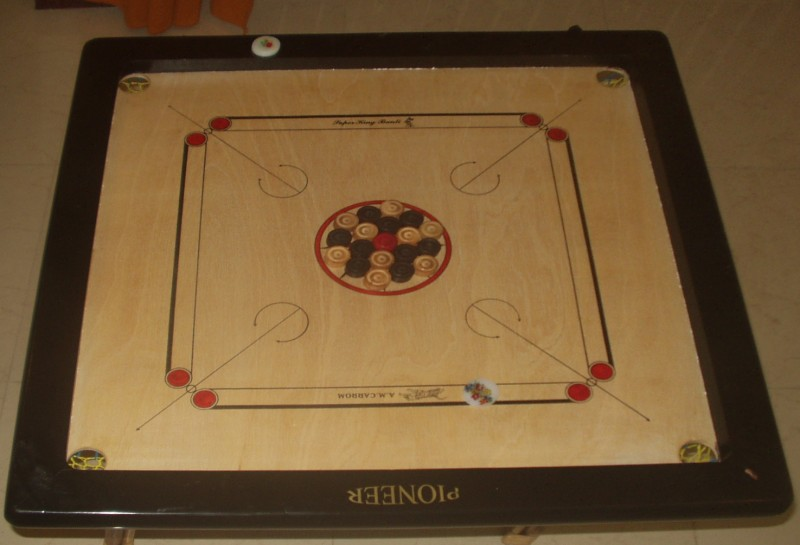 A Carrom board